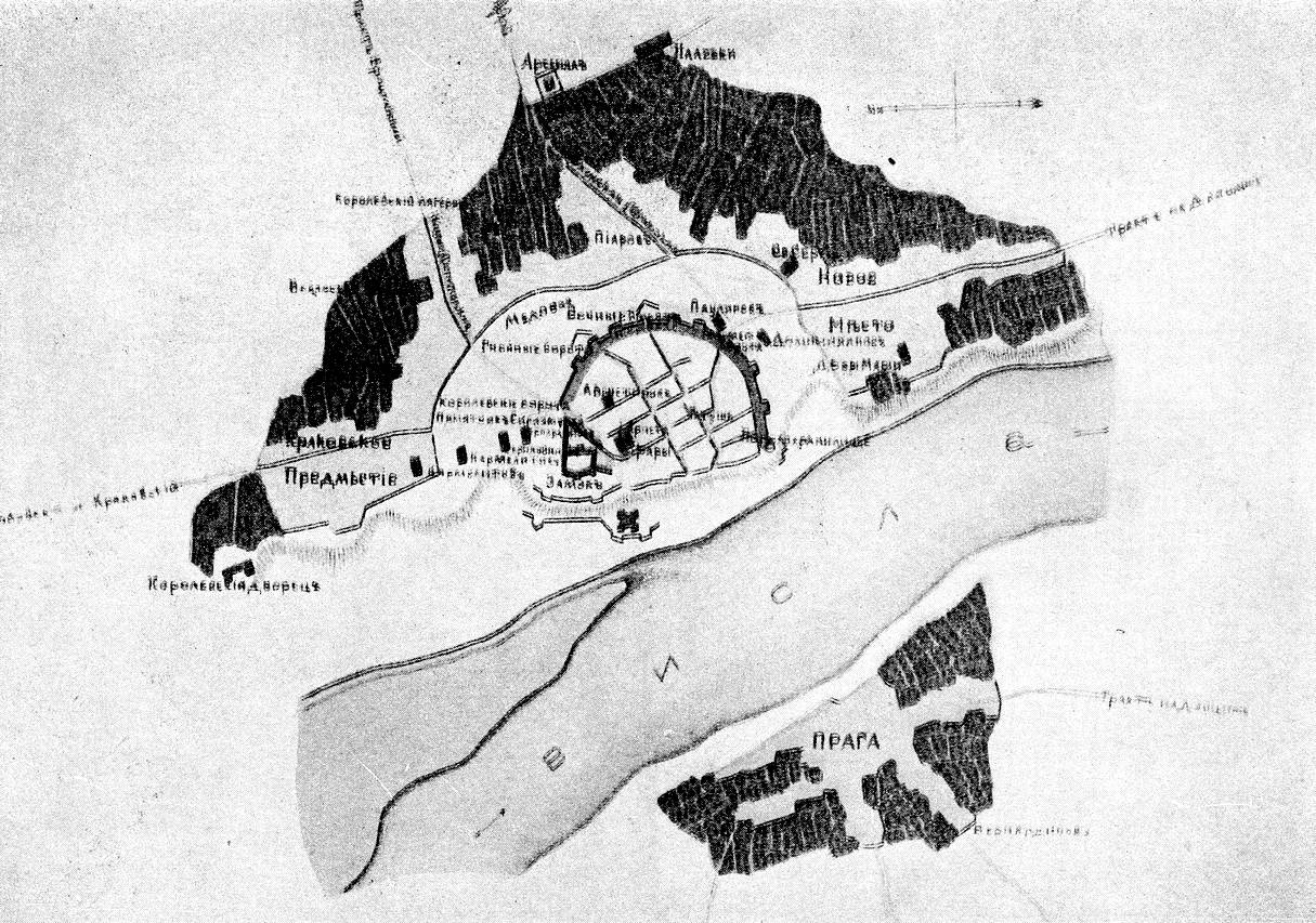 Данное изображение было использовано в статье «Варшава» опубликованной в пятом томе «Военной энциклопедии», который был издан книгоиздательским товариществом Ивана Дмитриевича Сытина в 1911 году в столице Российской империи городе Санкт-Петербурге.